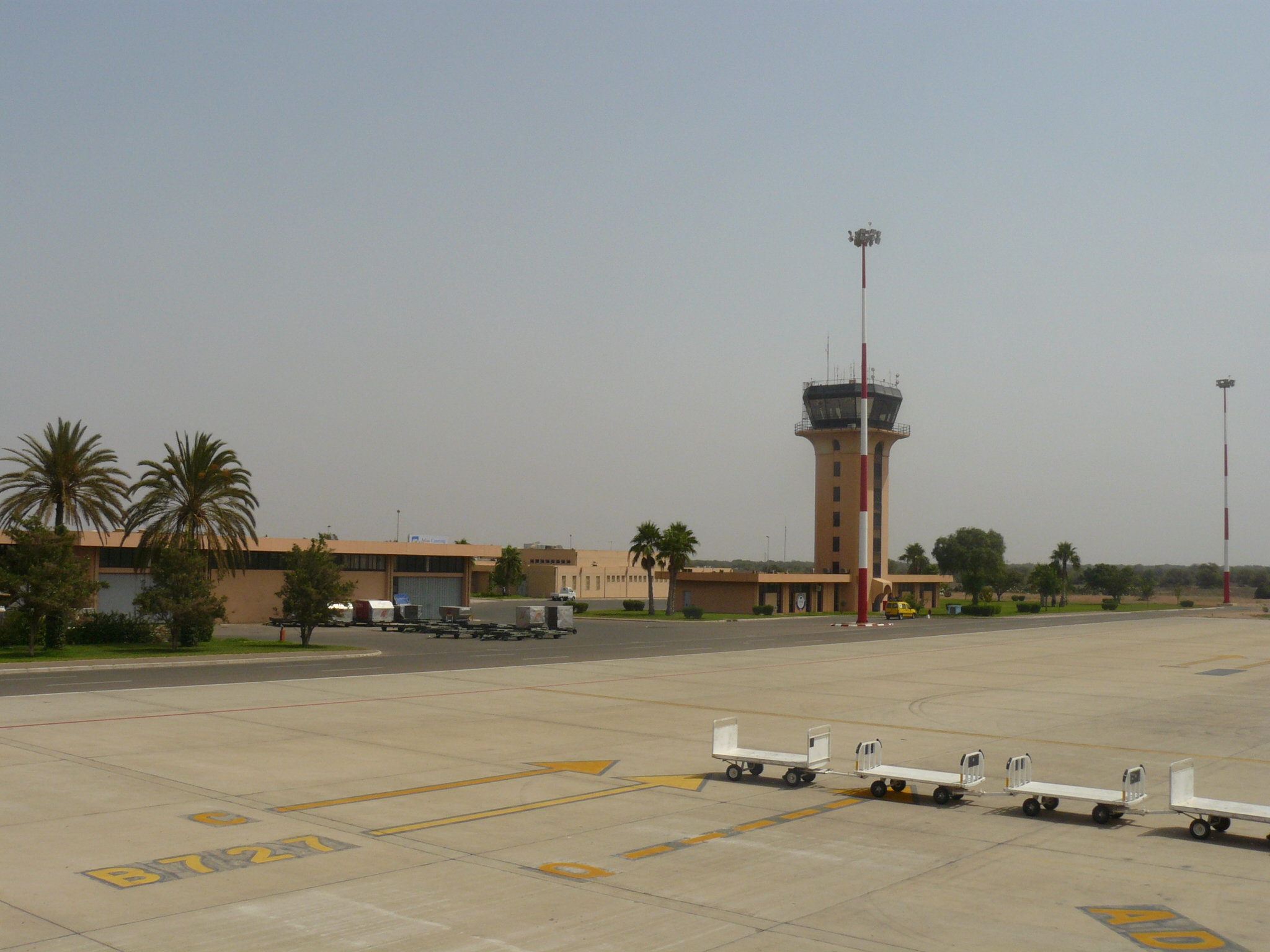 Agadir Airport.